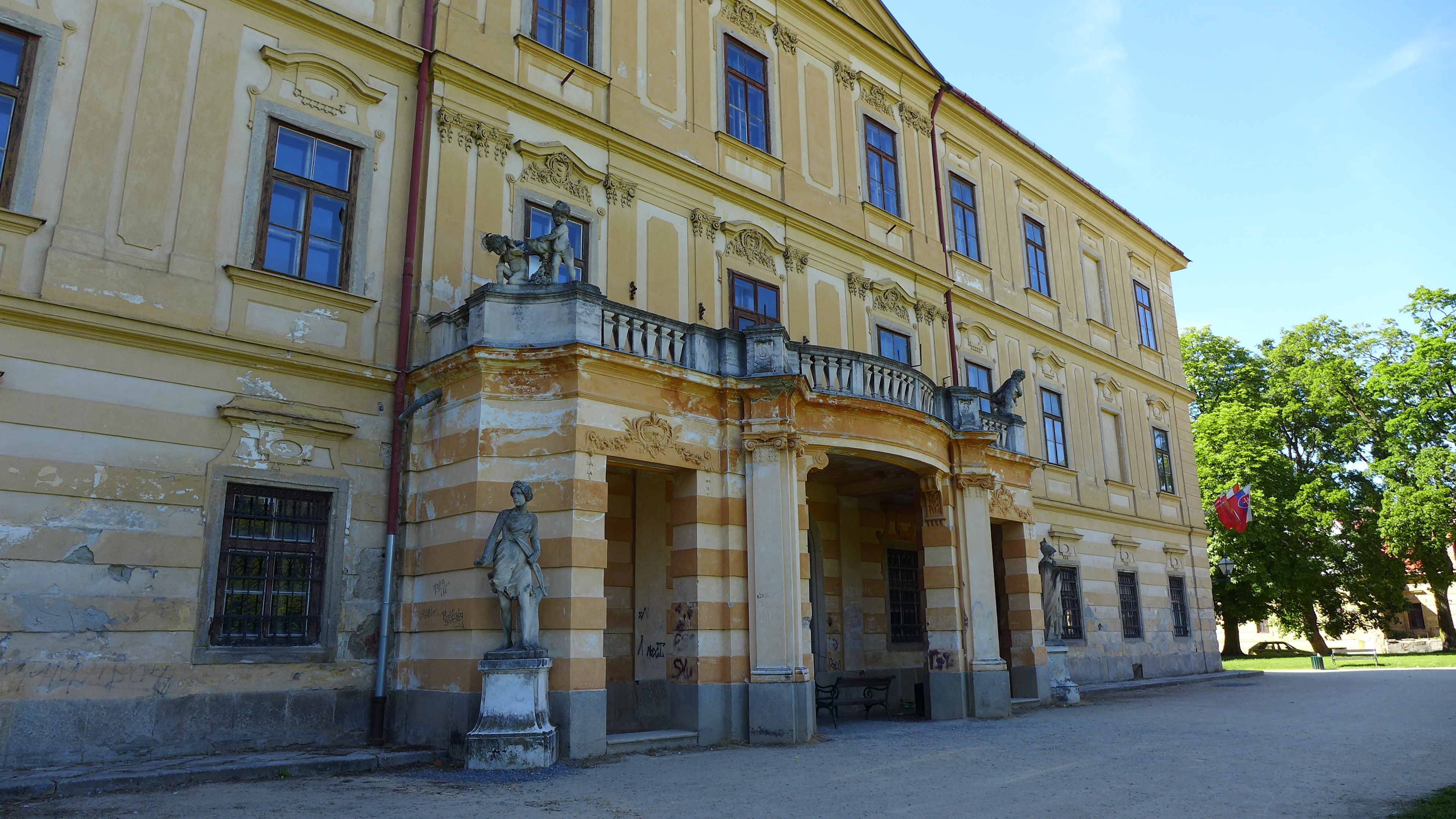 Zámek Jemnice s parky, Husova 1, 2, 3, Havlíčkovo náměstí 8, 47, Obůrka 174, Tyršova 622, 872